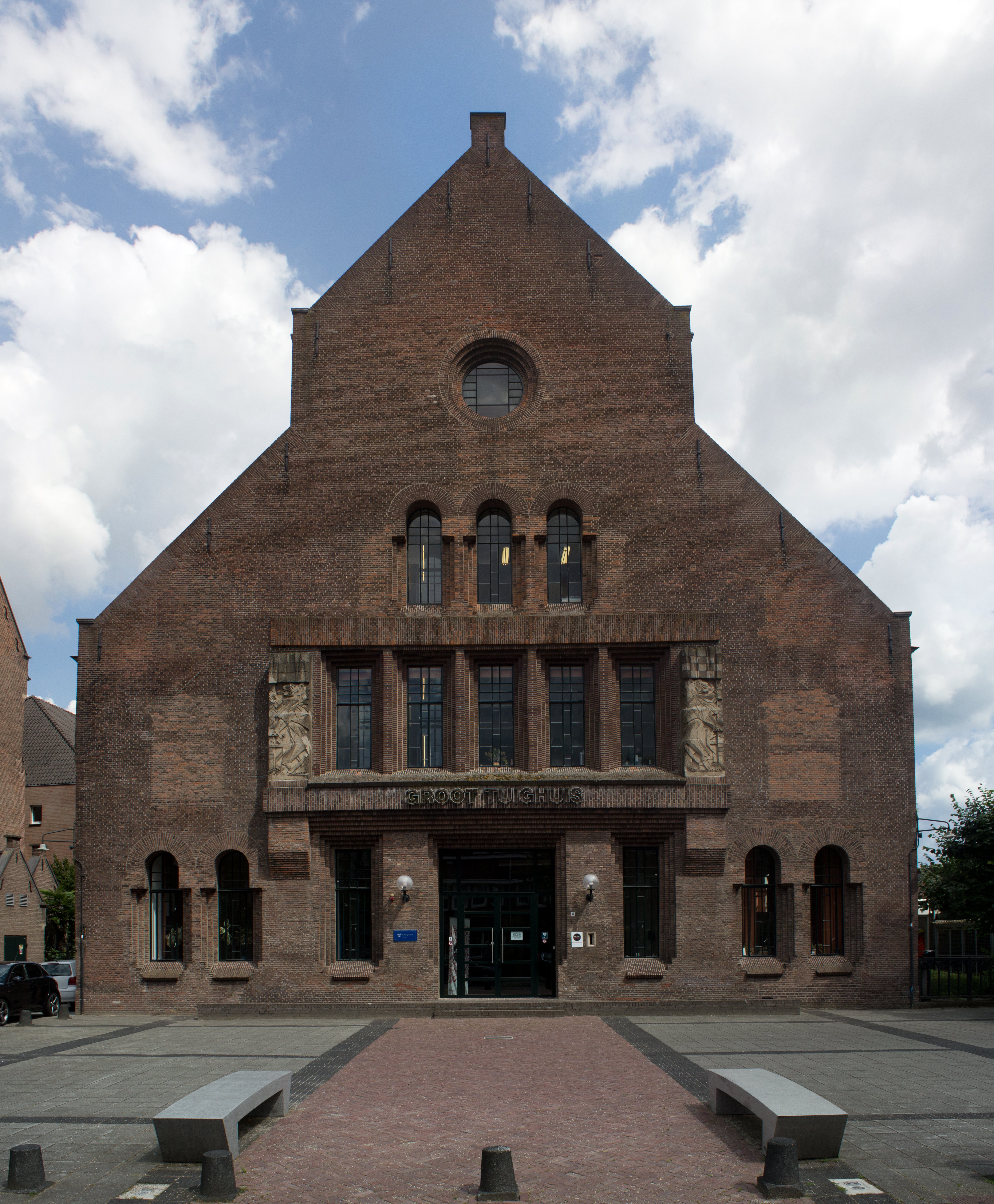 Het Groot Tuighuis te Den Bosch